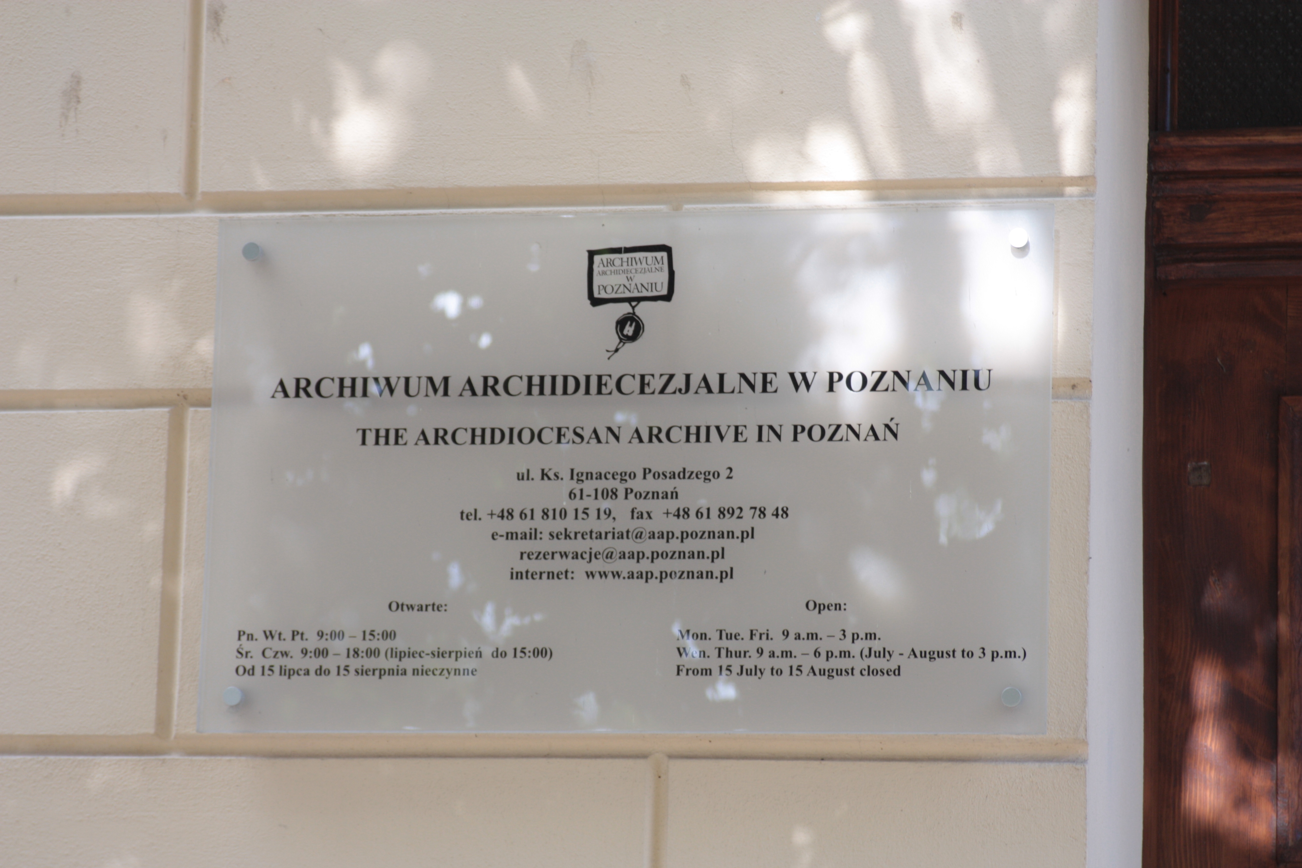 Poznań, ul. Posadzego 2 - dom mieszkalny, obecnie Archiwum Archidiecezjalne (zabytek nr A 057)